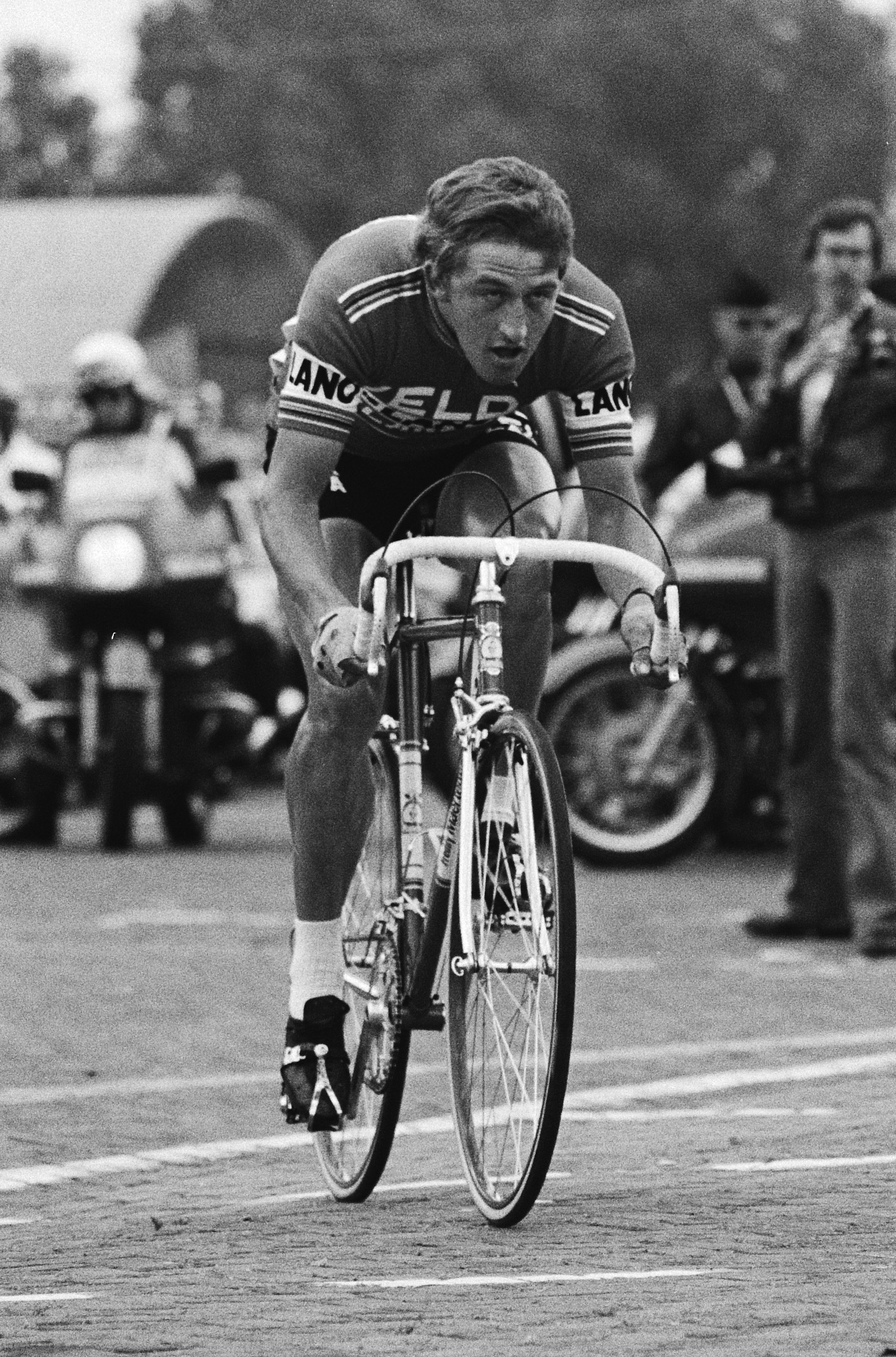 Freddy Maertens lors du prologue du Tour de France 1978.